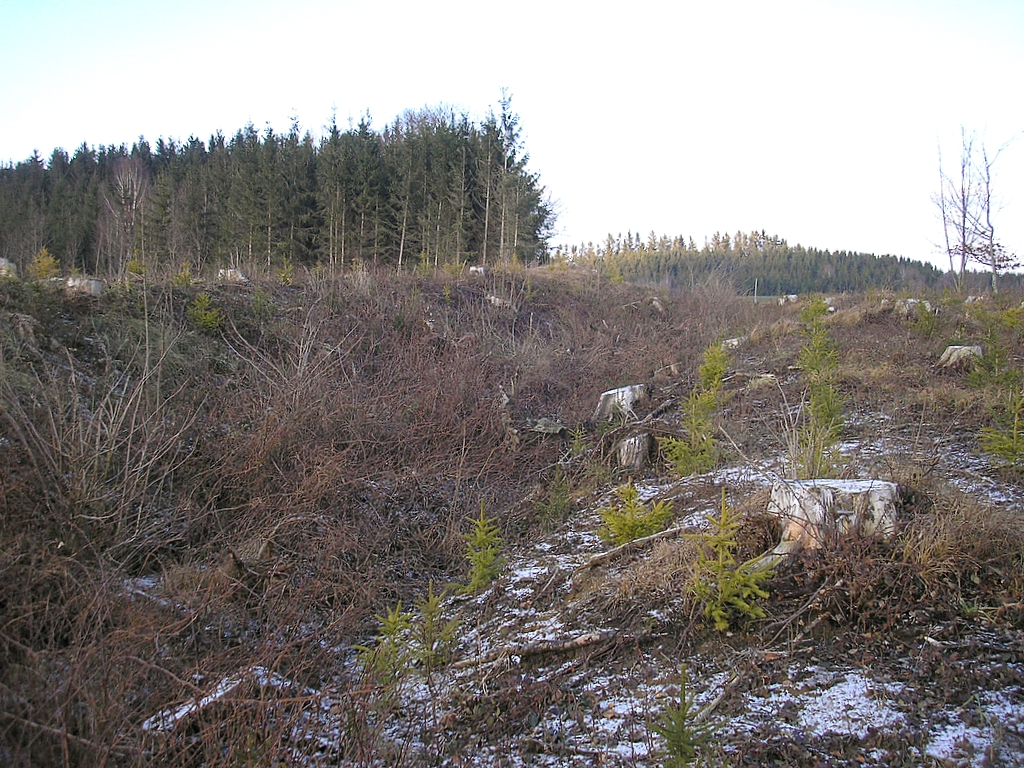 Frühmittelalterlicher Ringwall bei Mittelstetten (Landkreis Fürstenfeldbruck, Oberbayern). Blick in den Wallgraben der Ostseite. Eigene Aufnahme, Dez. 2007 / Early Middle Ages ringwork castle near Mittelstetten (Landkreis Fuerstenfeldbruck, Upper Bavaria, Germany). The eastern fortifications. View into the moat. Own photo, Dec. 2007